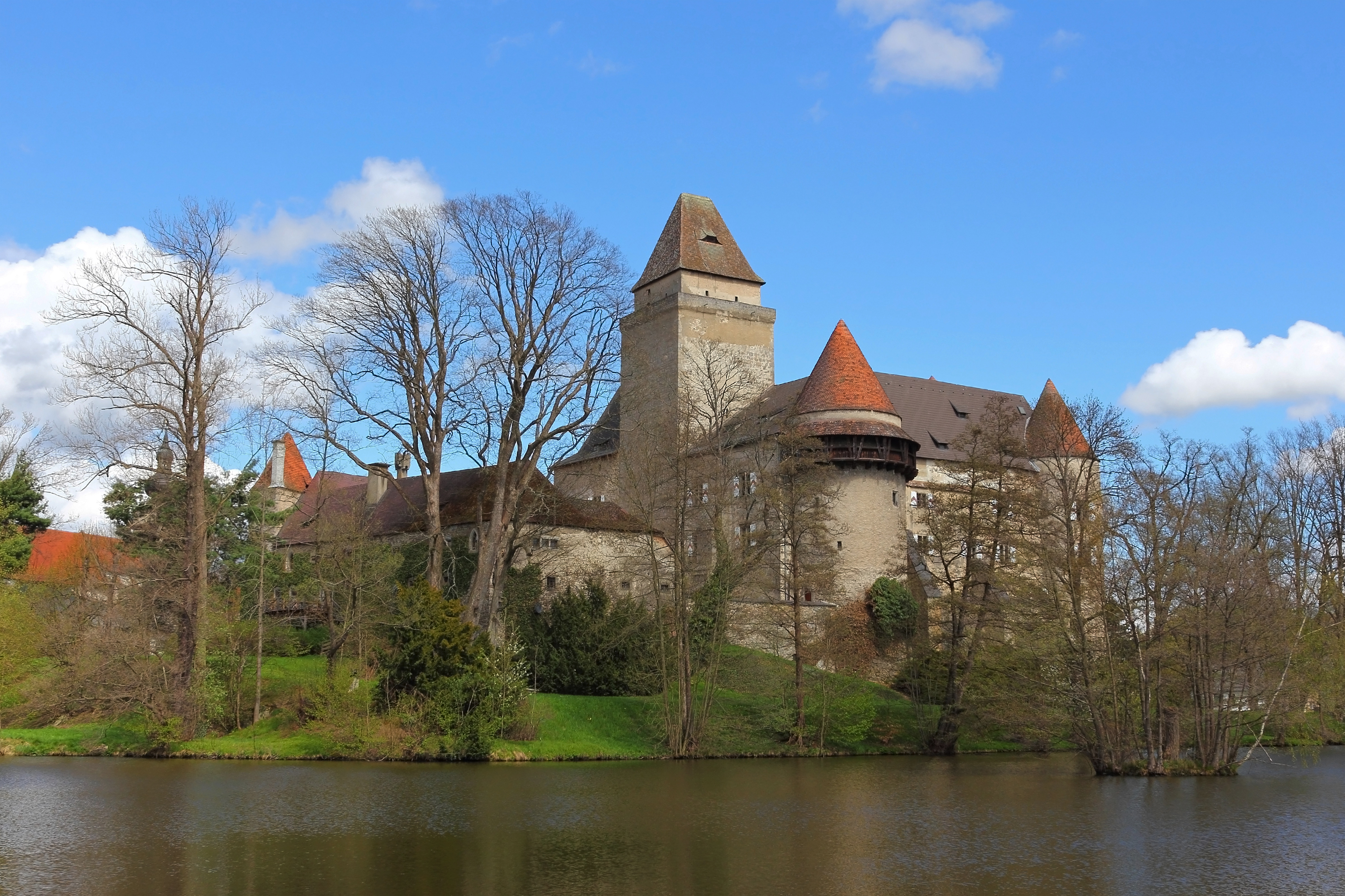 Burg Heidenreichstein ist die größte erhaltene mittelalterliche Wasserburg in Niederösterreich.